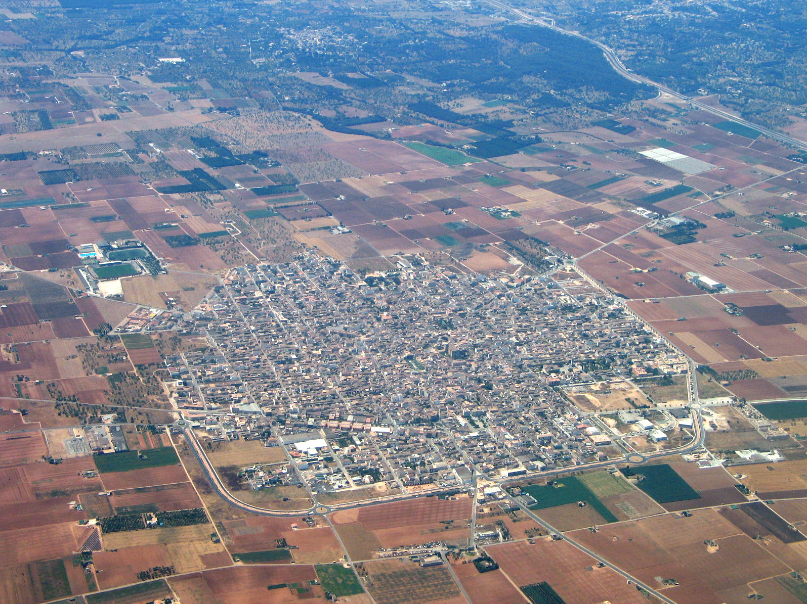 vue d'avion de Sa Pobla, îles Baléares, Espagne